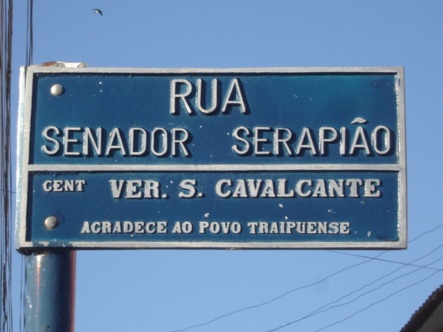 Placa da rua principal da cidade de traipu, Rua Senador Serapião.